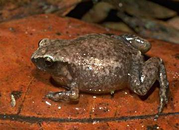 Austrochaperina robusta Nouvelle version de Austrochaperina robusta : niveaux ; retaillage.